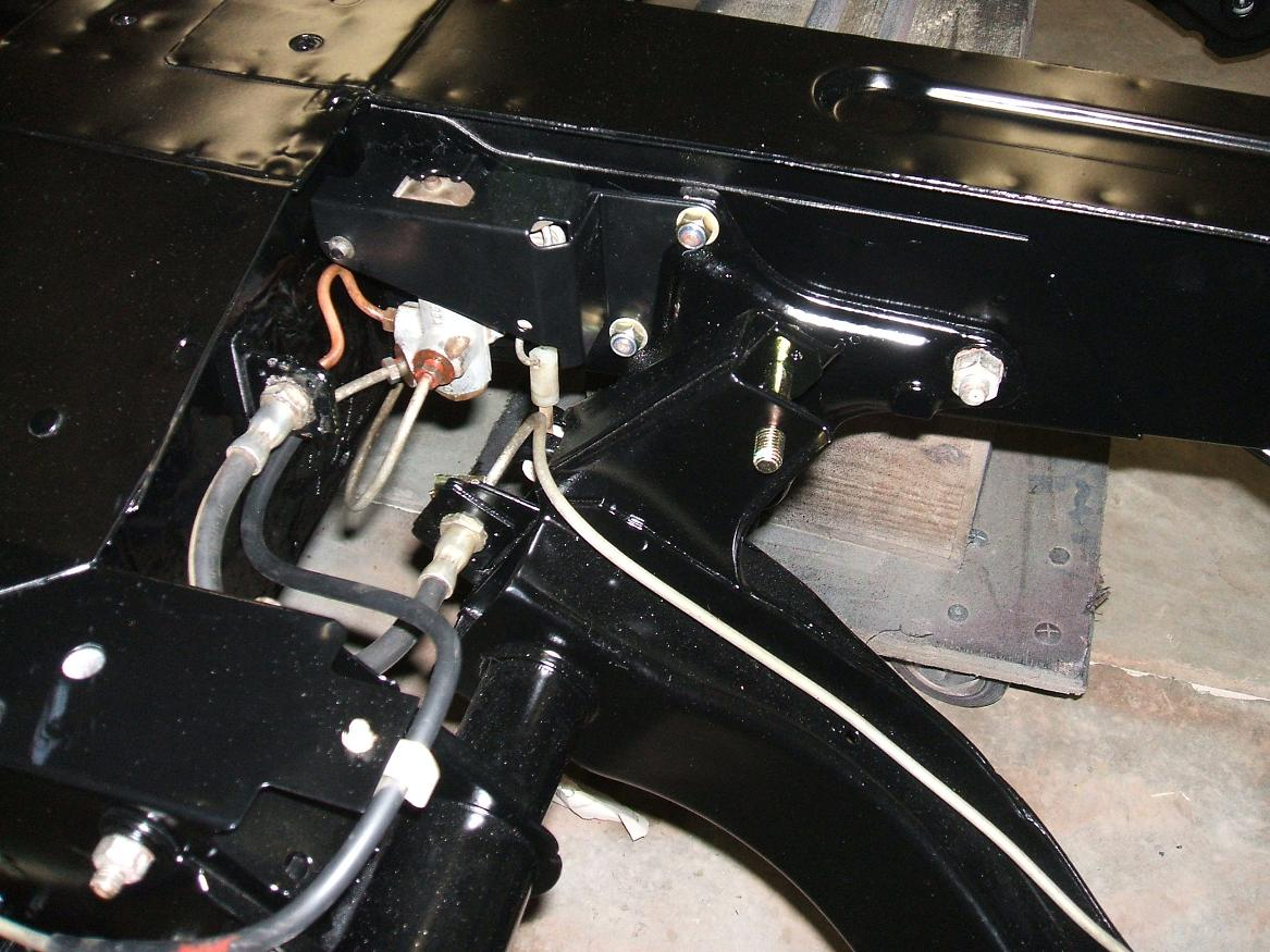 répartiteur